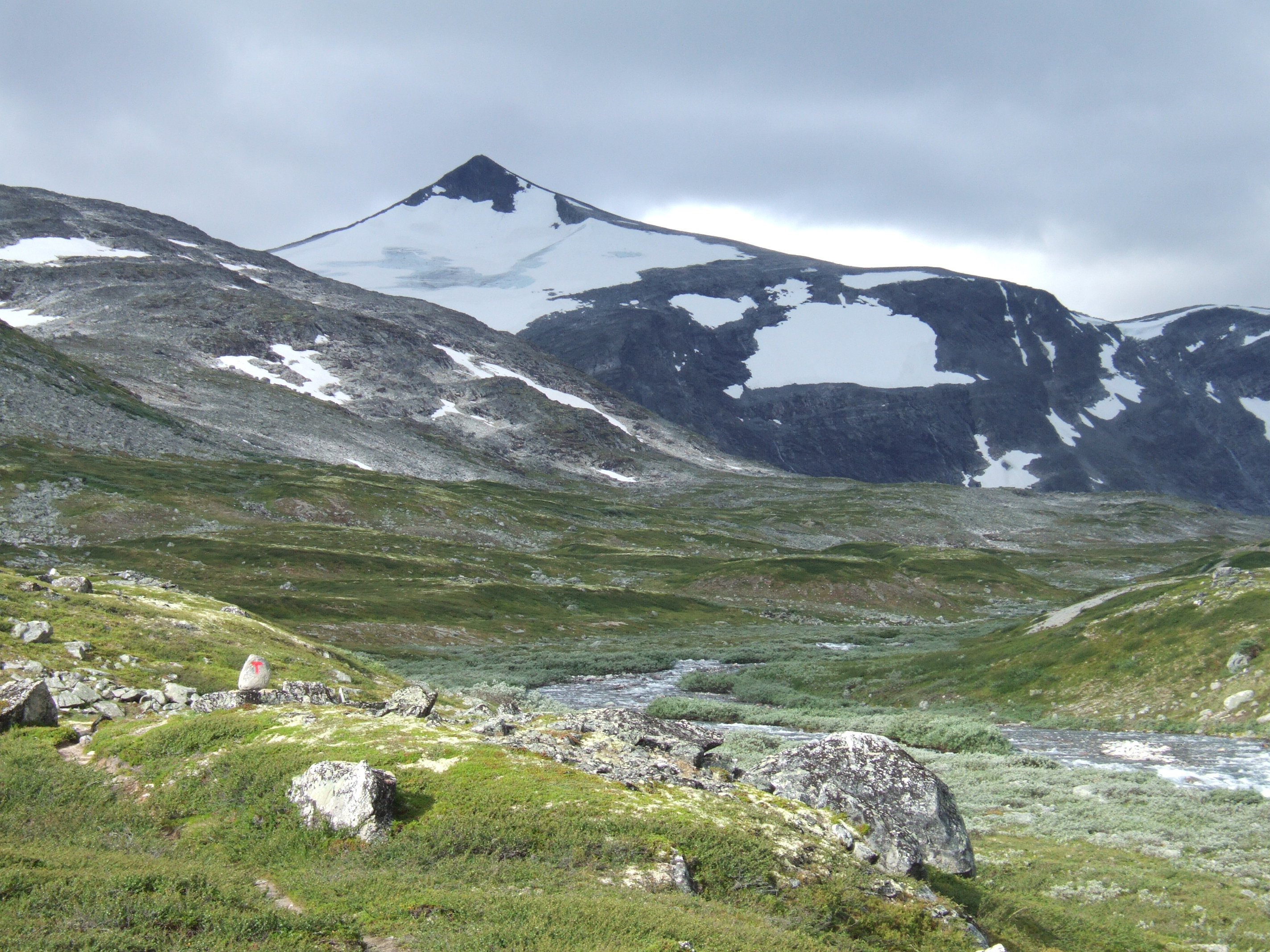 Karitinden (1982 meters above sea level) is the second highest among Tafjordfjella. Only Puttegga is higher. The peak of Karitinden marks the border between the three municipalities; Skjåk (Oppland) and Norddal and Rauma (both in Møre og Romsdal).